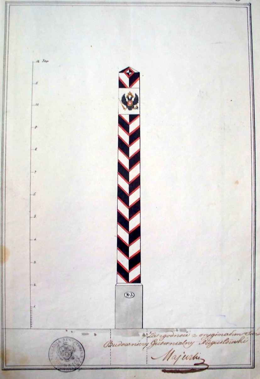 Na mocy ukazu Mikołaja I z 23 lutego (7 marca) 1837 r. dokonano przemiany województw na gubernie. Na dokumencie ukazującym znak graniczny znajduje się pieczęć oraz podpis Budowniczego Gubernialnego Augustowskiego.